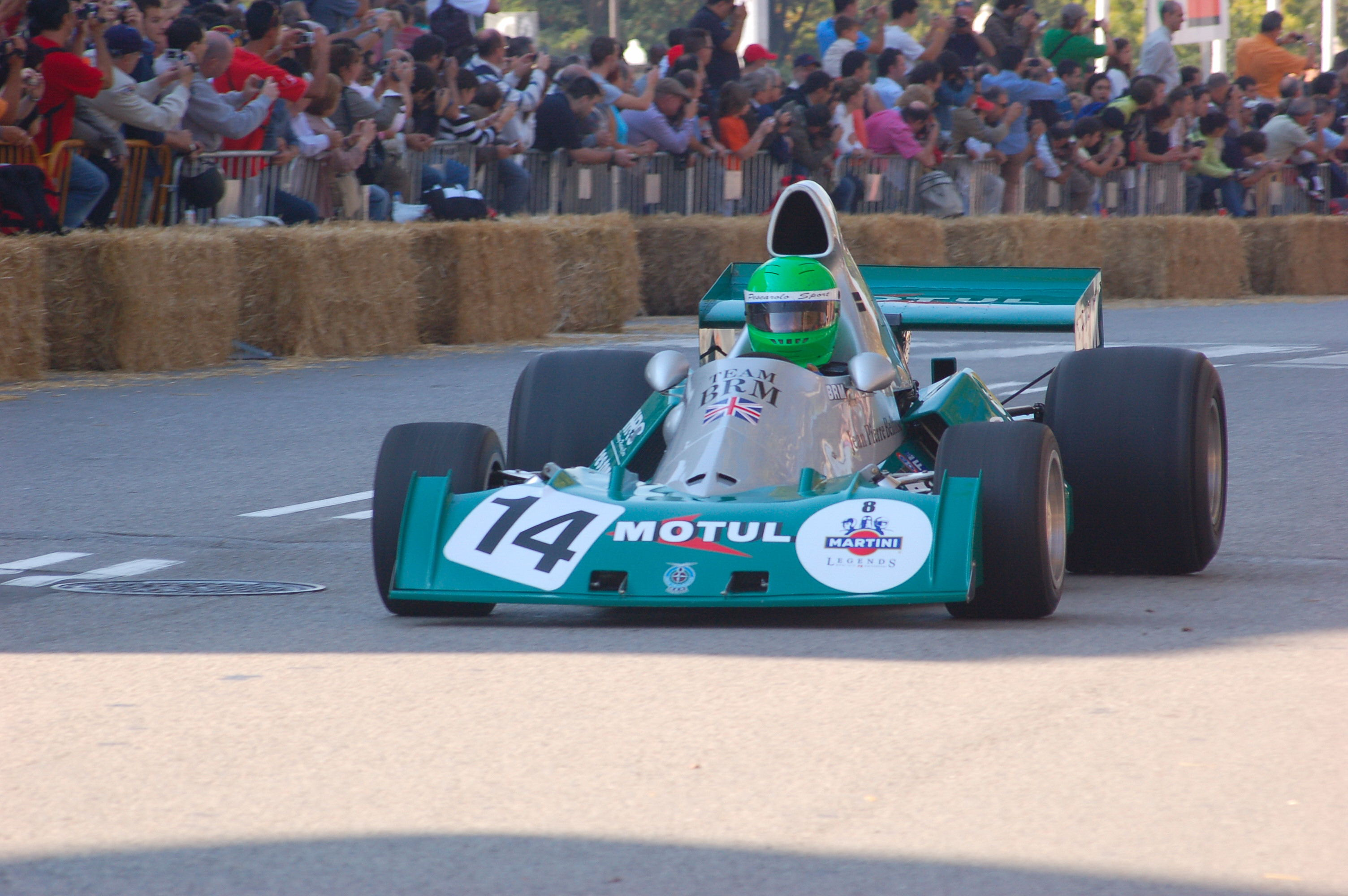 BRM BP201 Motul - Henri Pescarolo